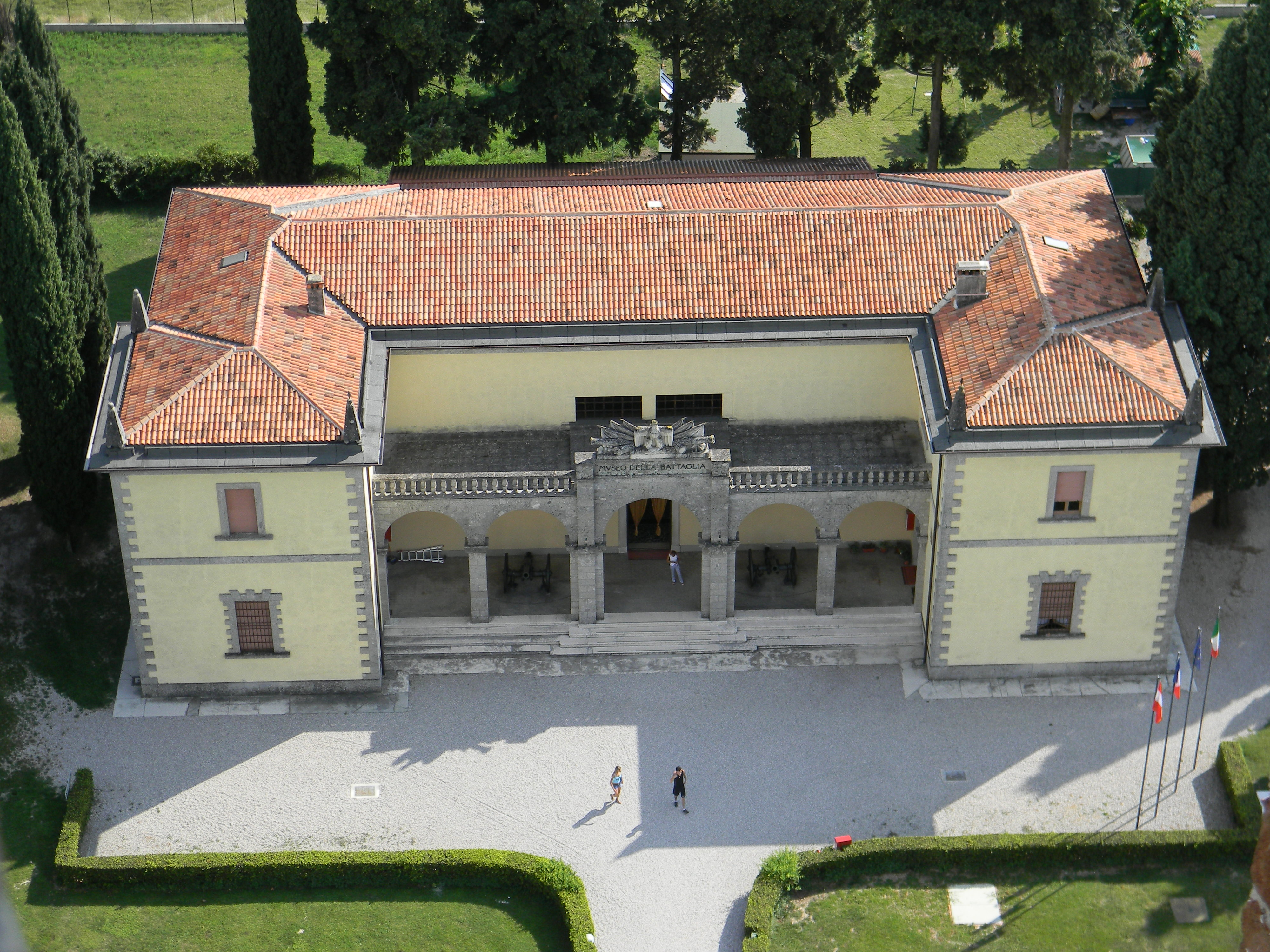 Musée de la bataille de San Martino.